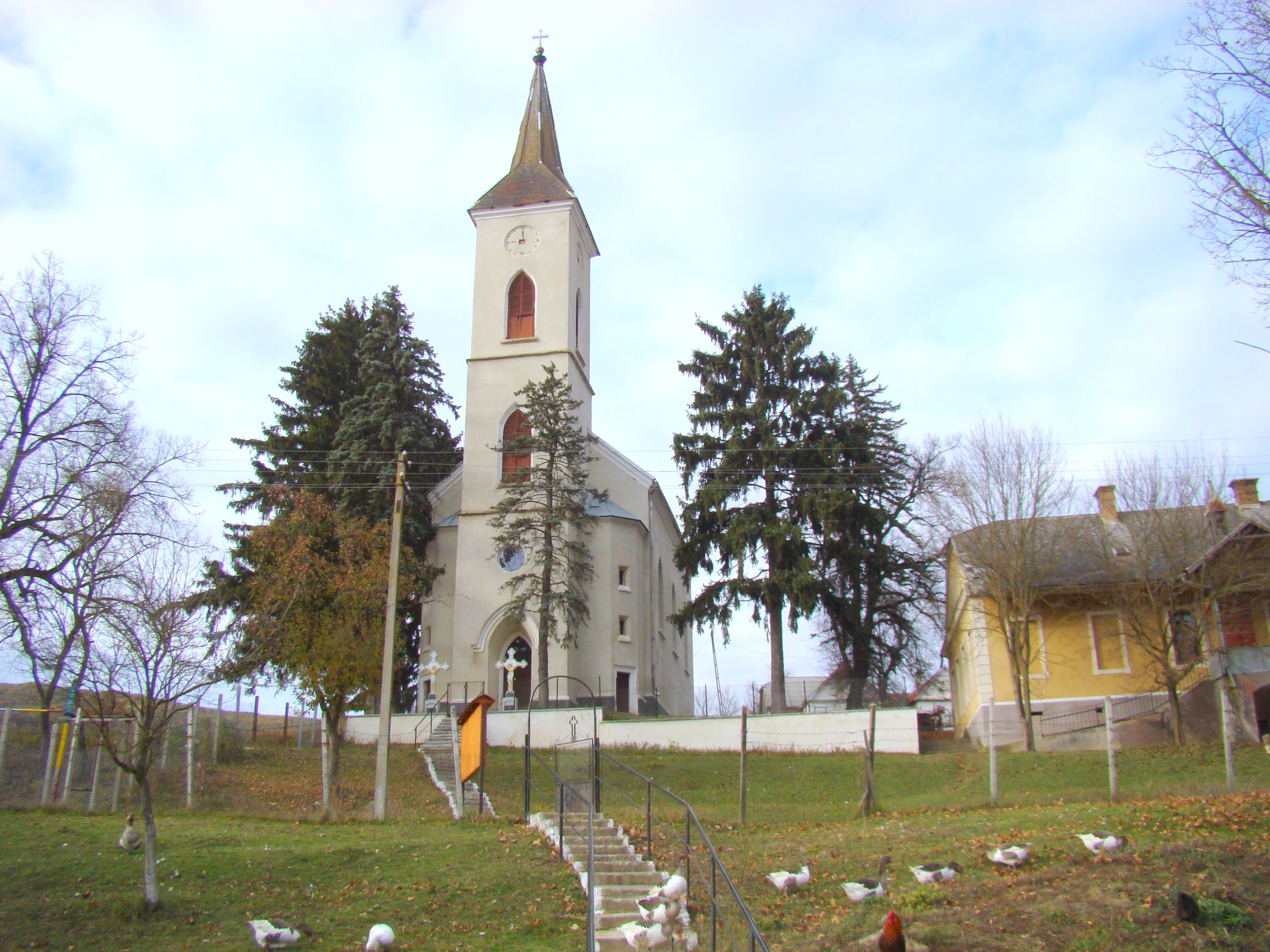 Biserica evanghelică C.A., azi biserica ortodoxă „Adormirea Maicii Domnului” din Albeștii Bistriței, județul Bistrița-Năsăud